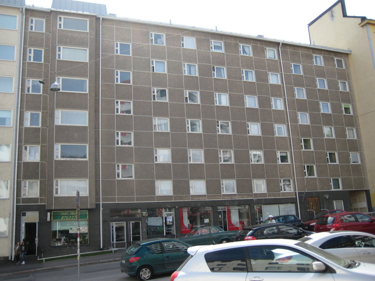 Asunto Oy Kalliotupa; Kolmas linja 12; Helsinki. Julkisivua jäsentää lähes neliskulmainen ruudukko, joka muodostuu ikkunoista ja ikkunalinjoja seuraavista vaaleista, kapeista listoista. Ruskea terastirappaus ja valkoiset ikkunapuitteet.